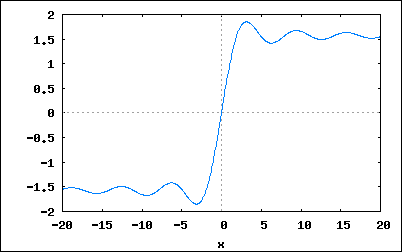 Gráfica de una integral senoidal